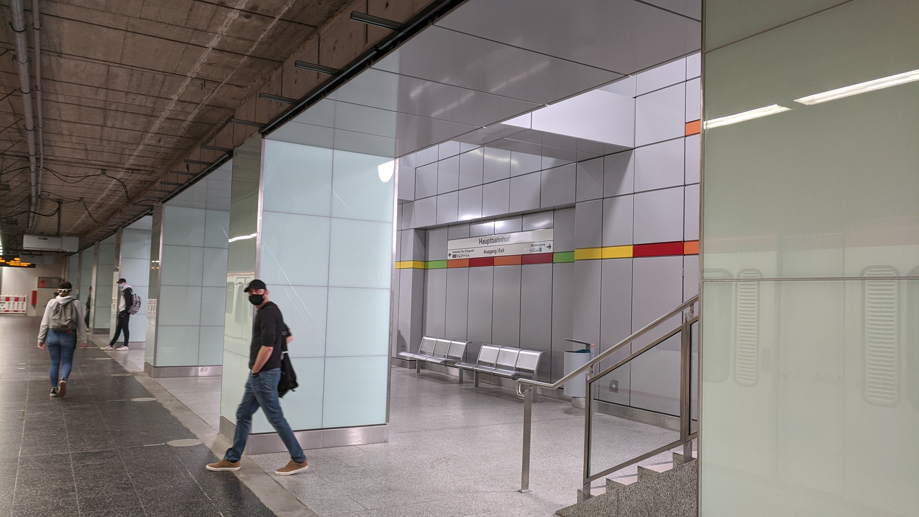 Stadtbahn Dortmund, U-Bahnhof Dortmund Hauptbahnhof, Der neu verbreiterte Bahnsteig Richtung Innenstadt. Der Bahnhof wird zur Zeit umgebaut. Dabei werden die vorhandenen Bahnsteige verbreitert und neue Zugänge eingebaut. Taken on 29 May 2020